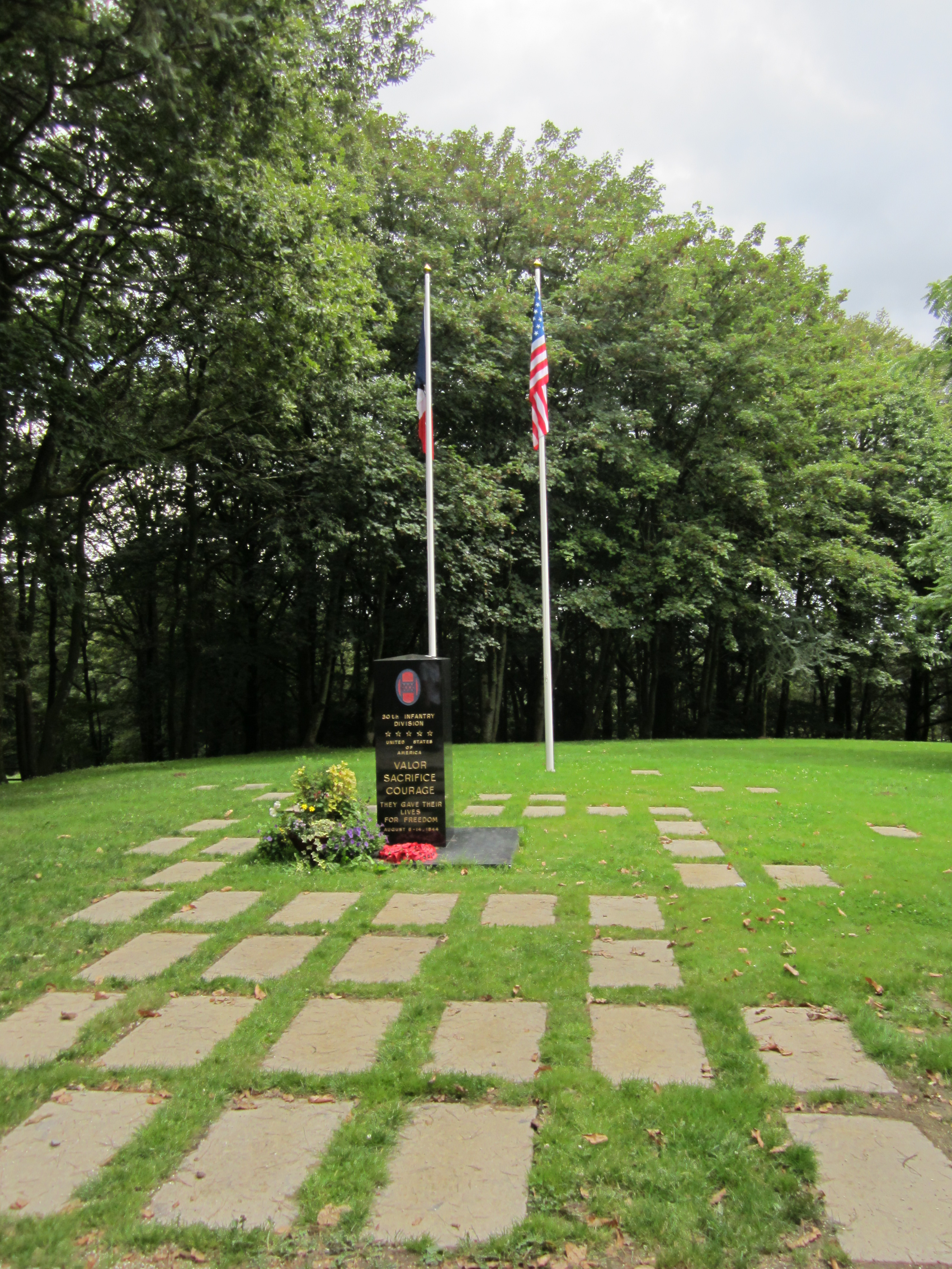 Mortain, Manche